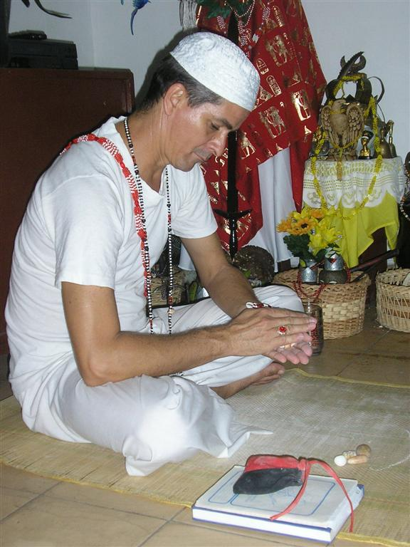 Santero de Cuba; Pedro Cesar Alfonso Ferrer, nombre de santo Obbàolorum. **** Estamos en la Habana, Cuba: Un santero humilde con amor por la religión, consagrado en Shangó con Oshún, desde siempre le ha gustado la religion Yoruba Afrocubana, es espiritista por naturaleza y conocedor de muchos hechizos para curar y quitar las cosas malas. Este humilde santero es espiritista por excelencia es especializado en las obras y brujerías con el orisha Shangò y su magia utilizando la gran union de la tierra del Yoruba Osha ejectuando una brujería para hacer el bien ****..